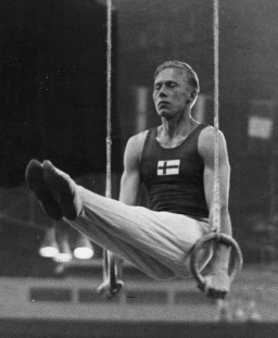 Veikko Huhtanen